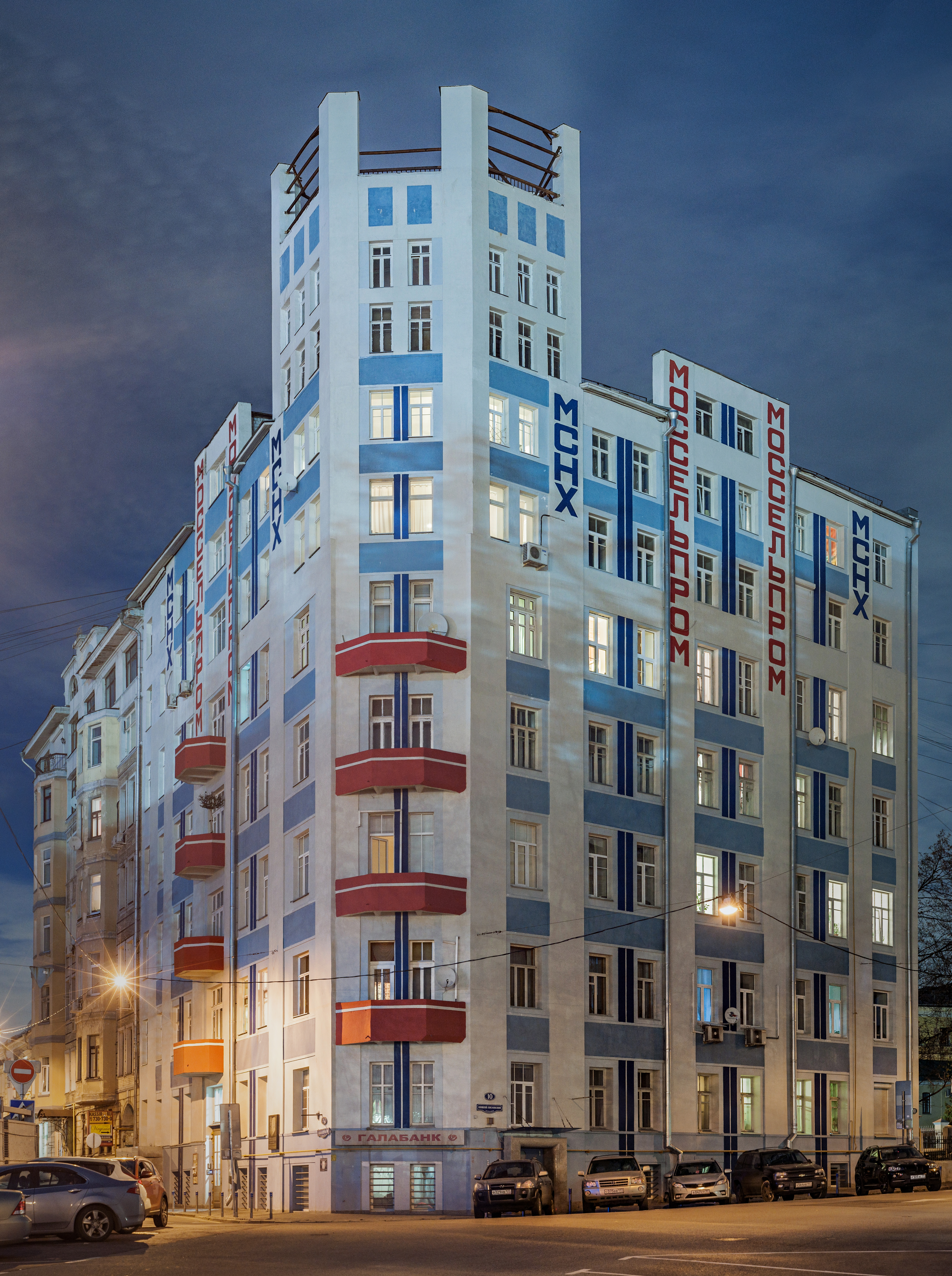 Здание МОССЕЛЬПРОМА